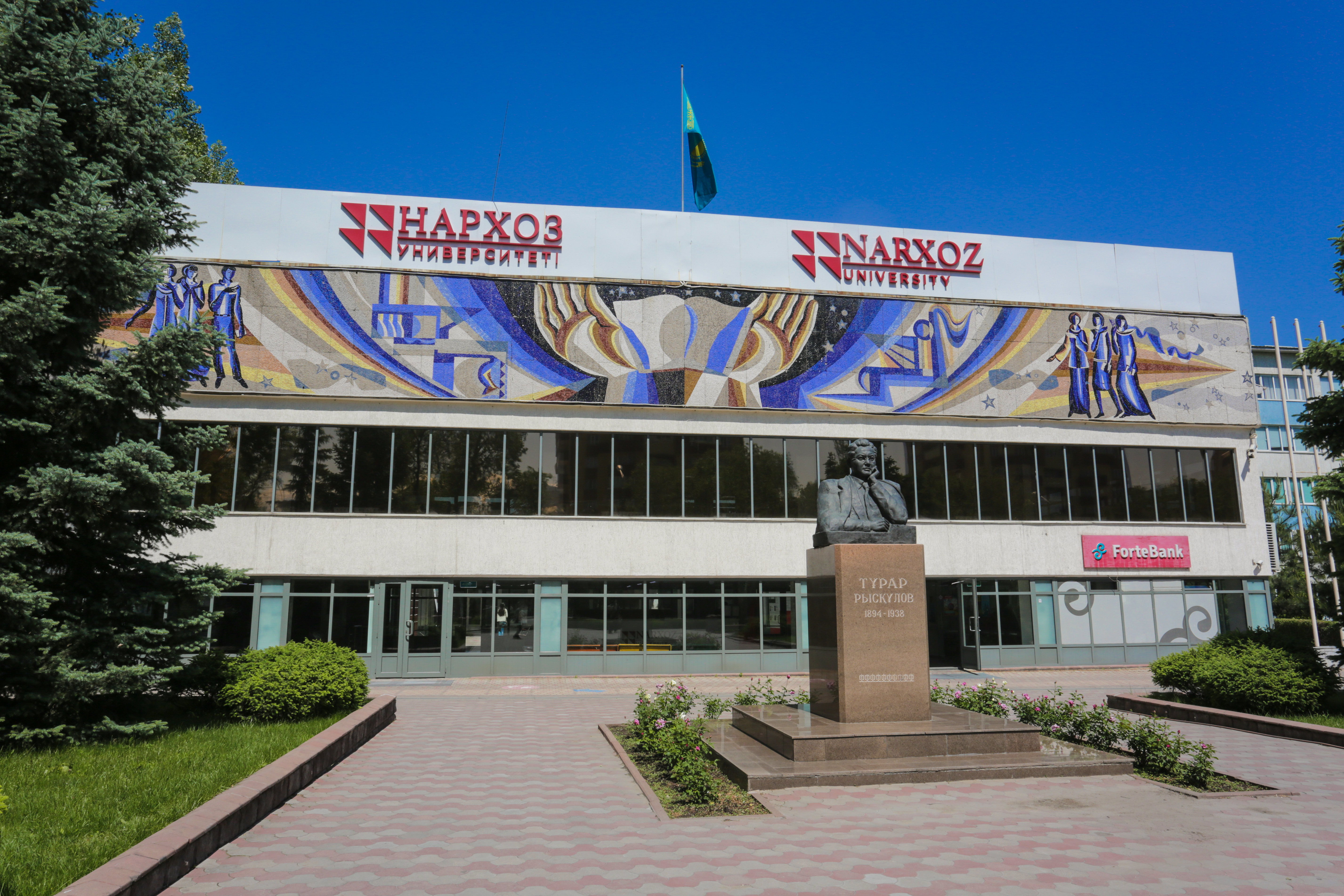 Университет Нархоз